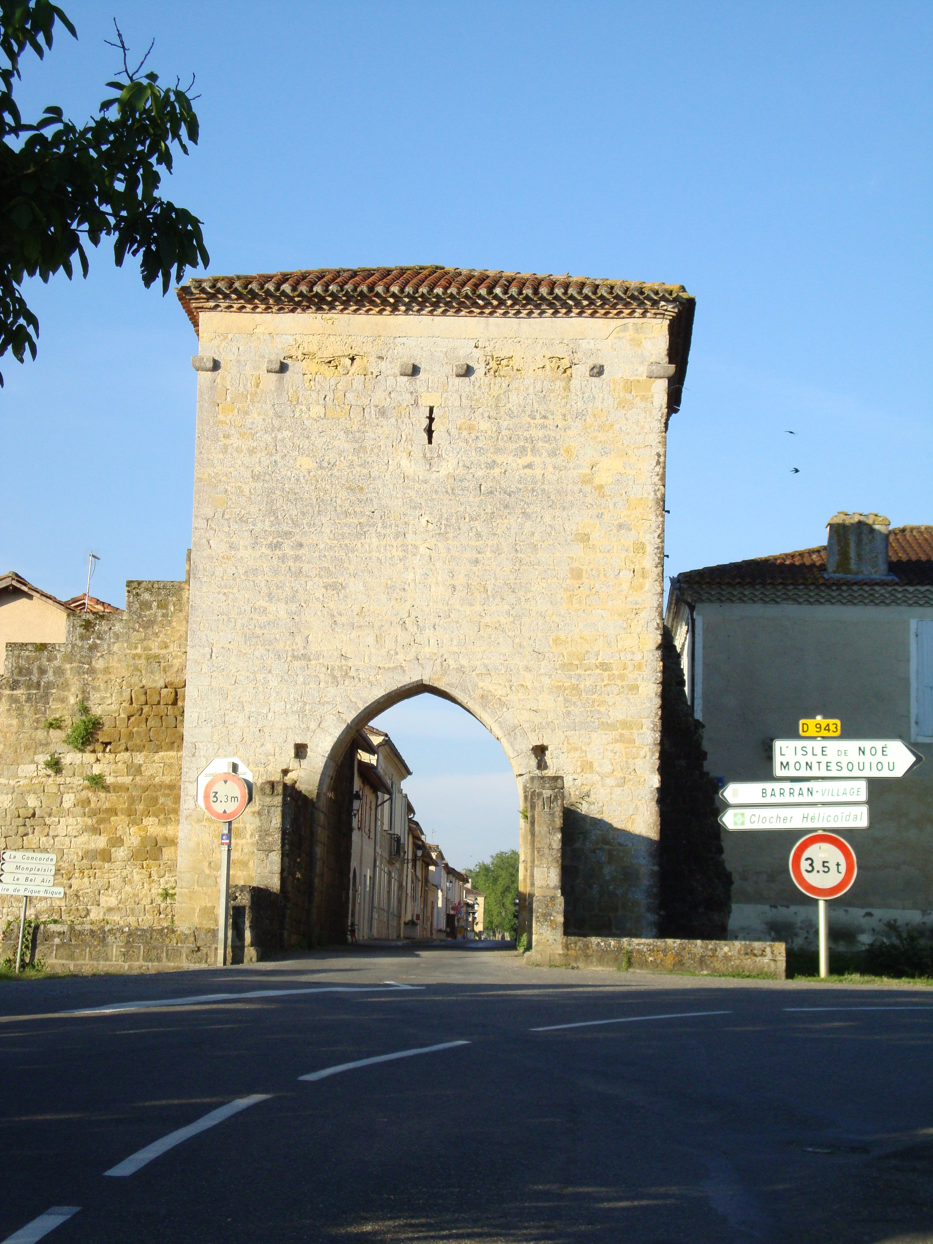 Barran (Gers, Fr) porte de la ville